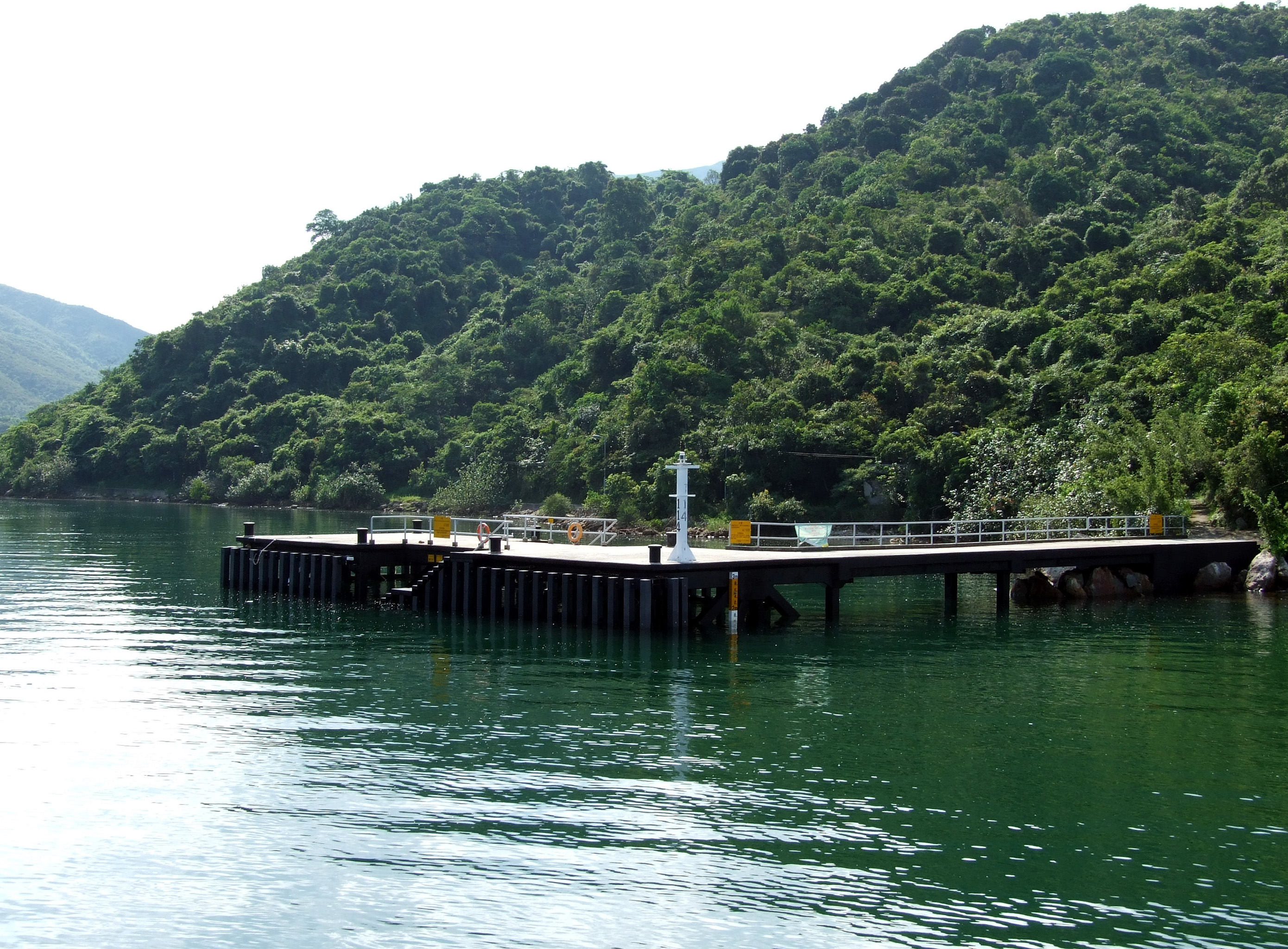 中文（香港）: 深涌公眾碼頭